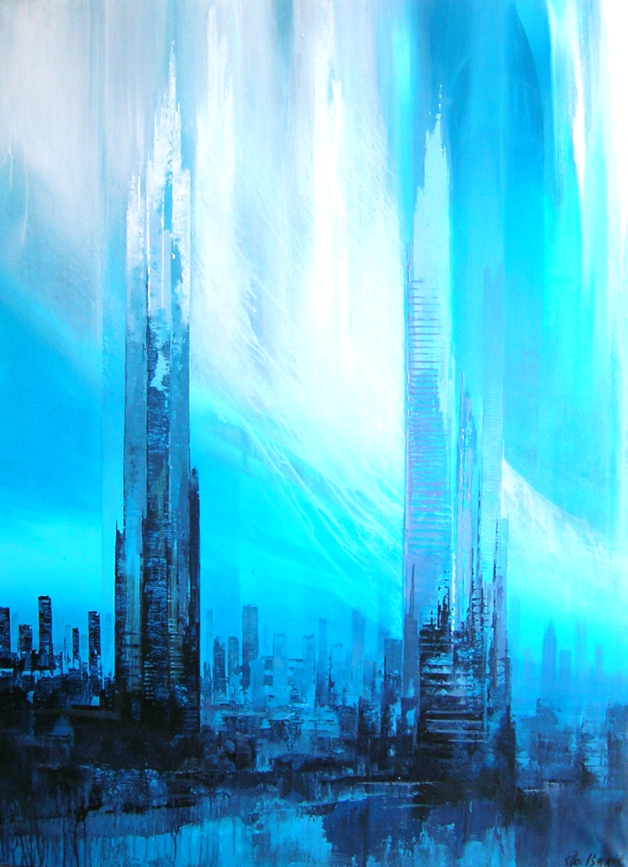 Nature et Architecture (huile sur toile 130x90)